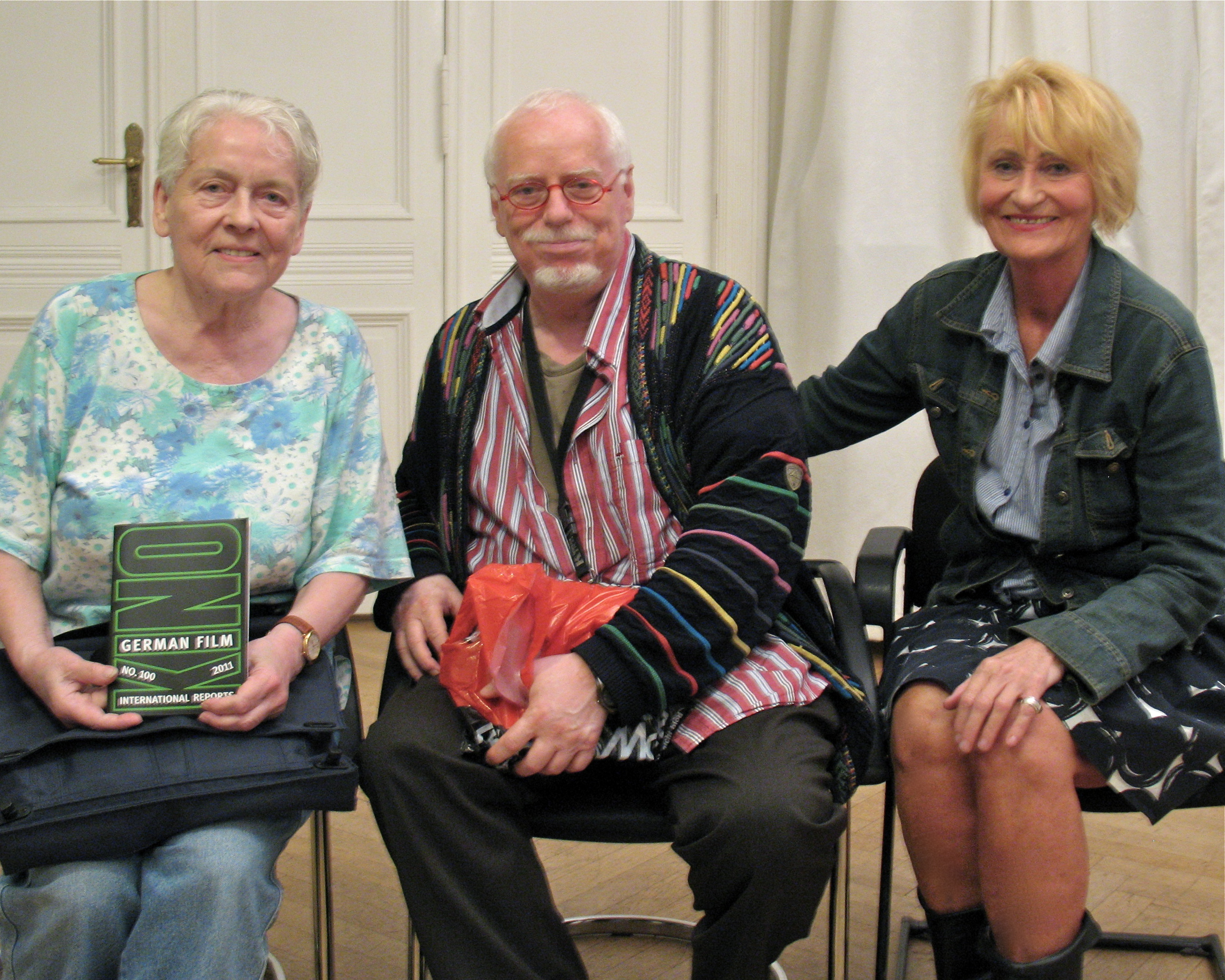 Dorothea Moritz, Lothar Lambert, Ulrike Schirm nach einer Inszenierung in der Schwulenberatung Berlin von Schirm